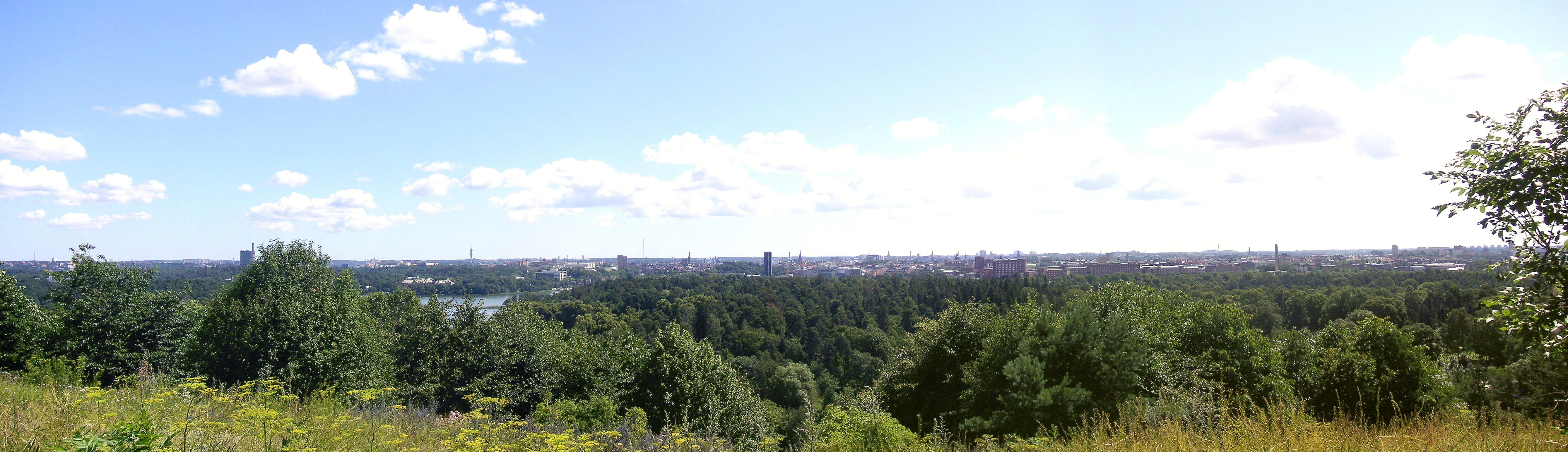 Frösundatoppen i Hagaparken